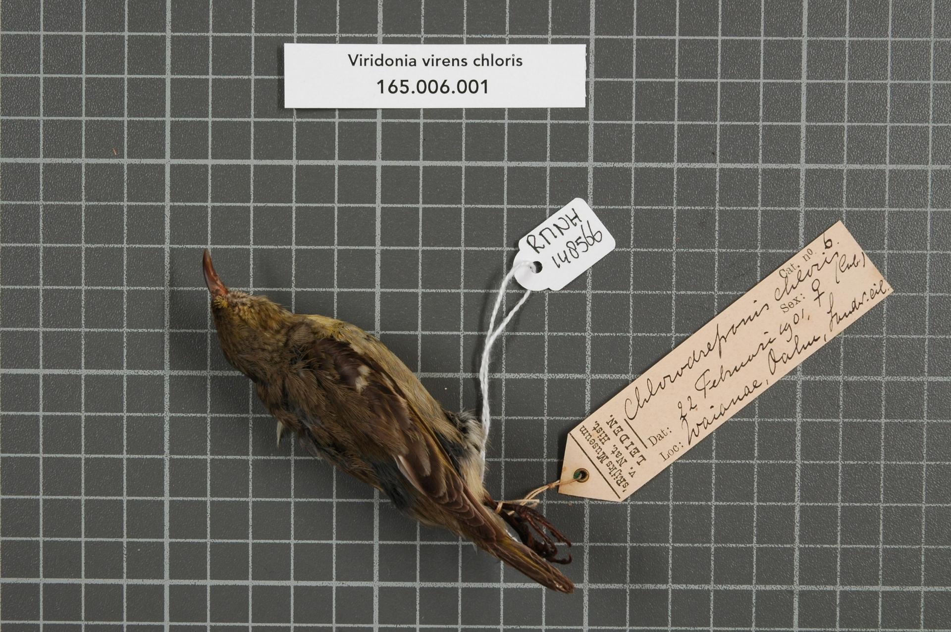 Viridonia virens chloris (Cabanis, 1851)